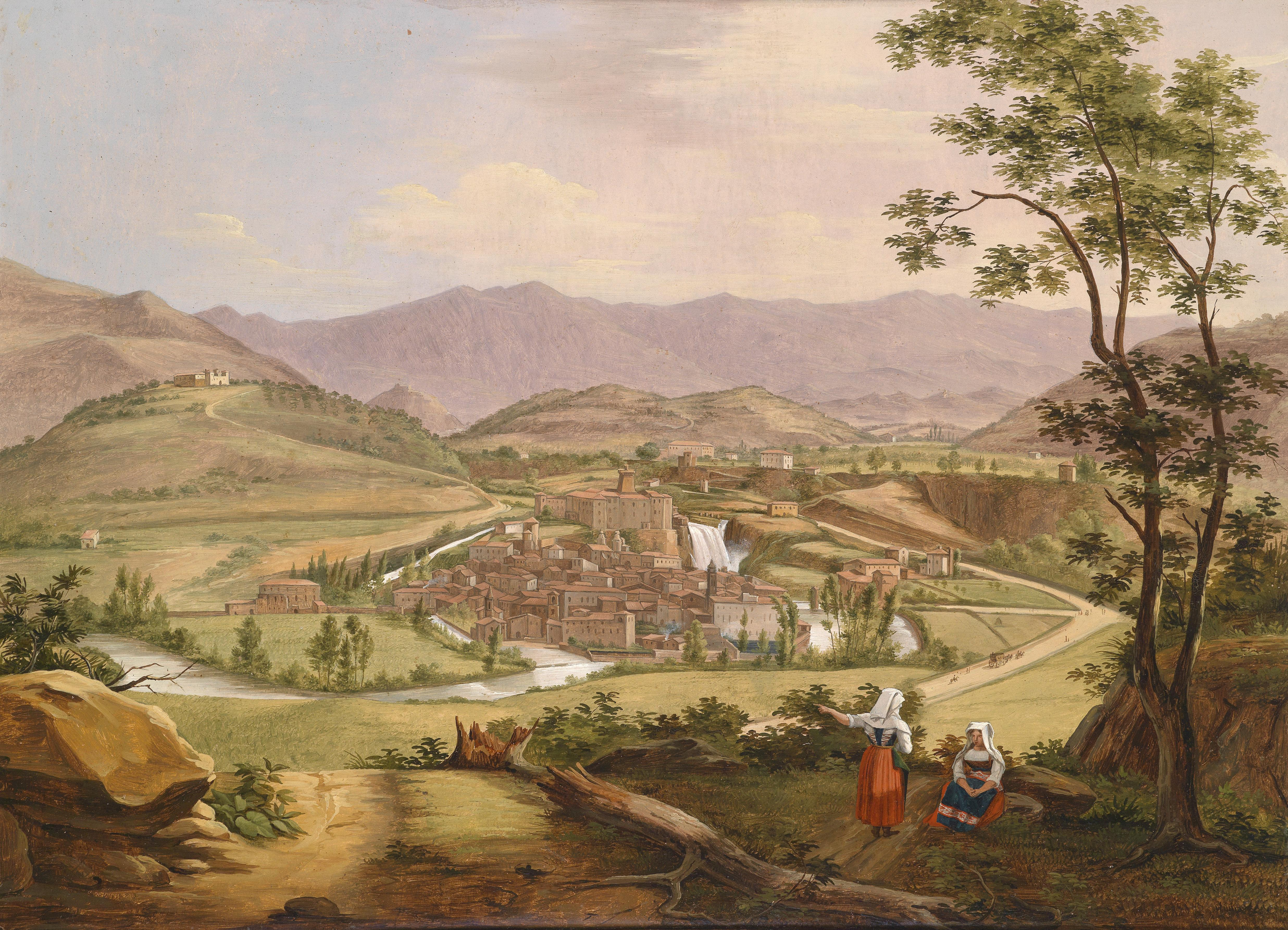 Blick auf die Liris Fälle bei Isola di Sora, Öl auf Leinwand, 43 x 58 cm